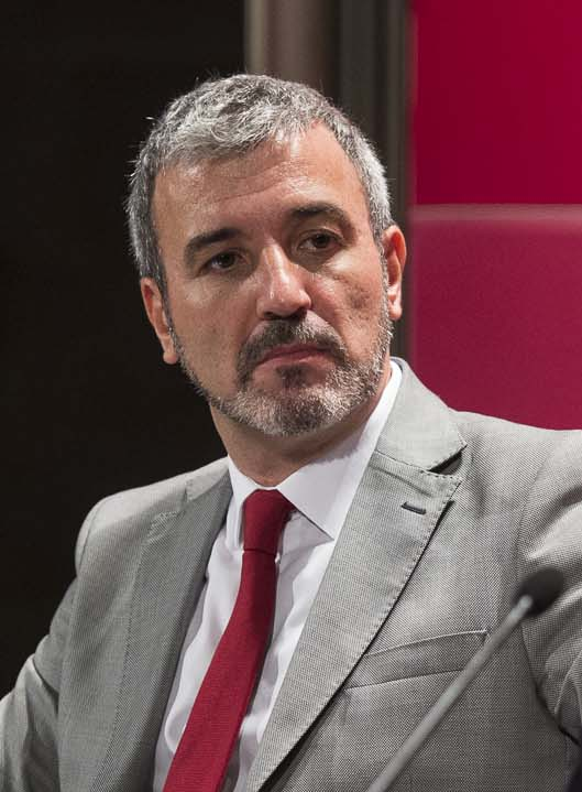 Dinars amb Jaume Collboni, 8 d'octubre de 2014